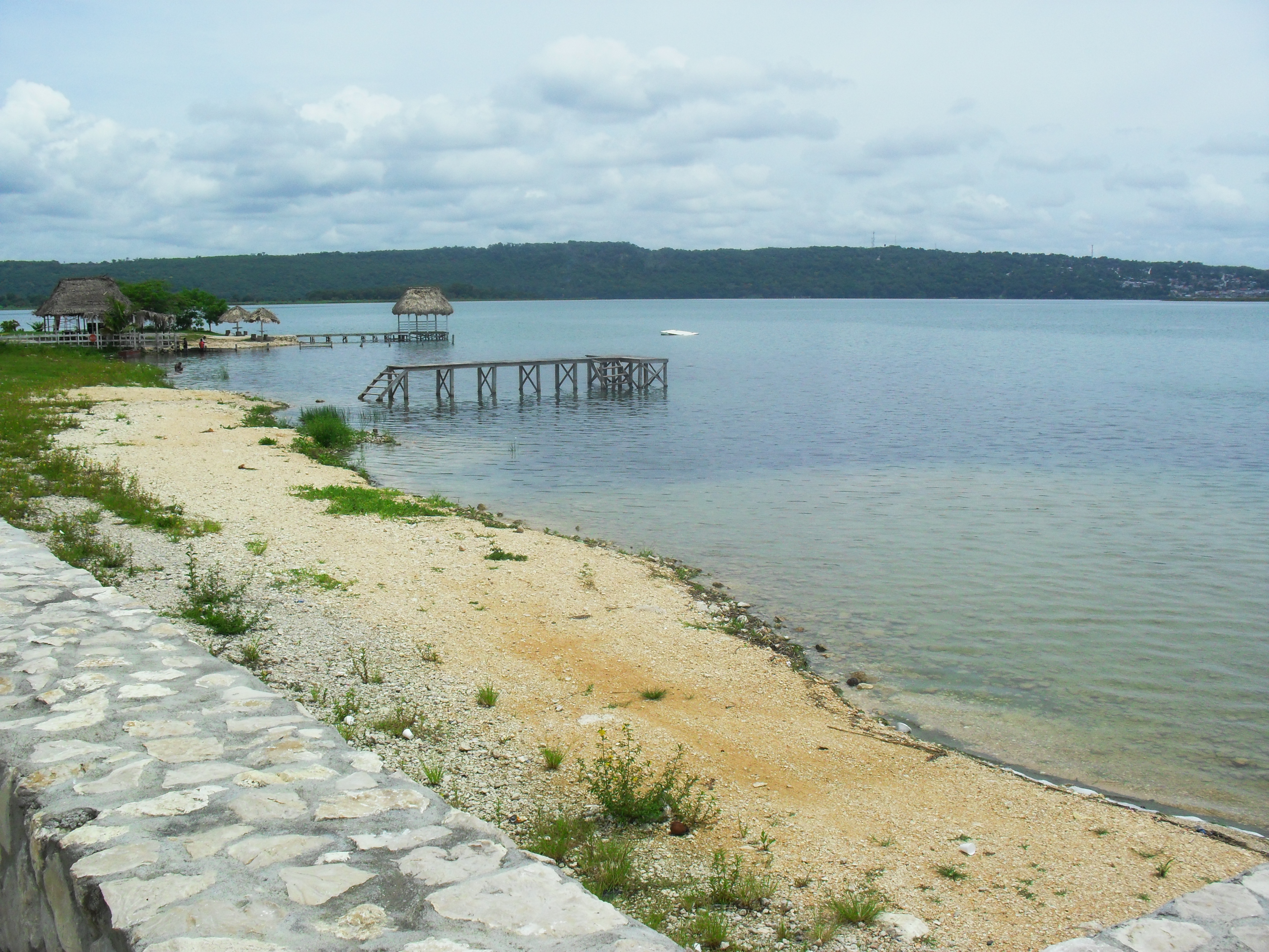 La orilla del balñerio el pedregal